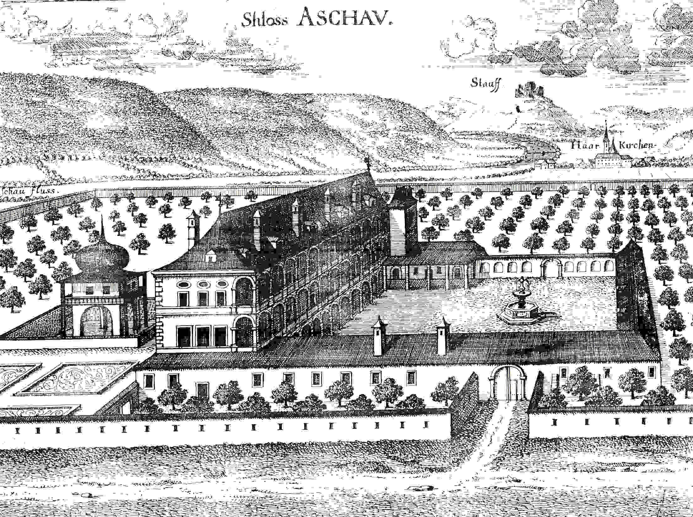 Schloss Aschach damals